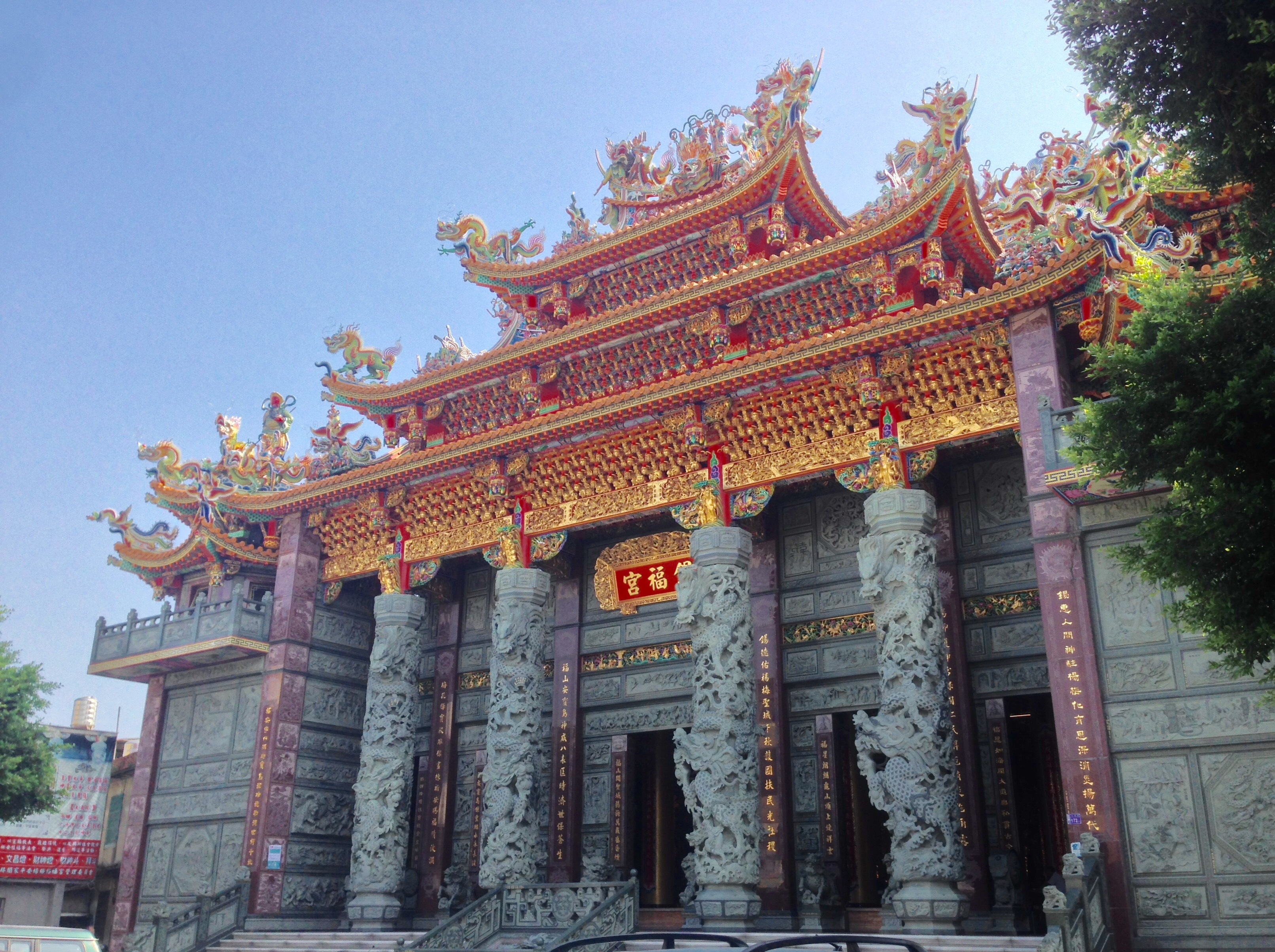 錫福宮一景